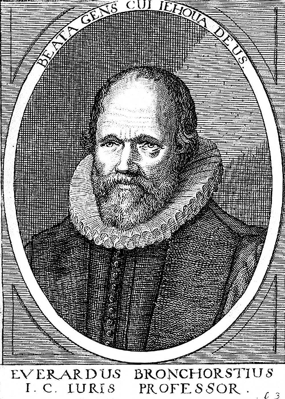 Everard Bronchorst (1554-1627) niederländischer Jurist